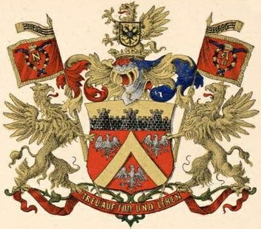 Totlebeni suguvõsa aadlivapp